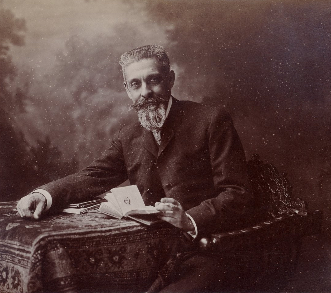 Maurice Desvallières (1857-1926)